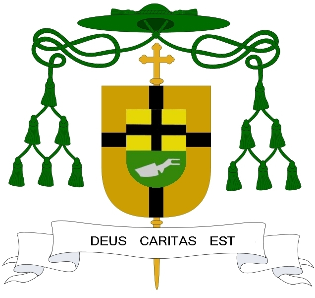 Wappen von Karl Reger, *1930, Weihbischof in Aachen (1986-2006)